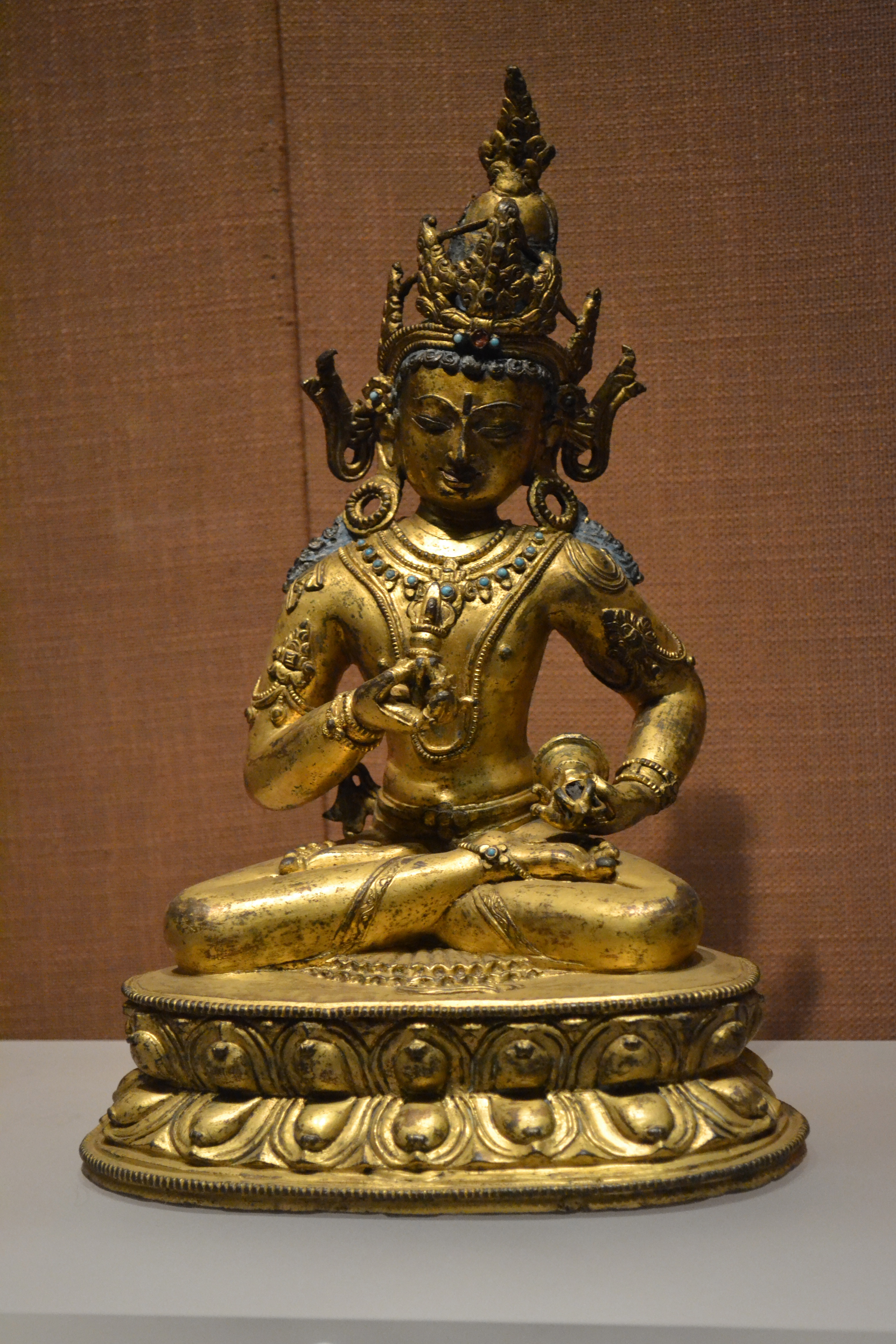 金刚萨埵菩萨像 元代（藏西或者藏中风格） 现藏于中国北京首都博物馆